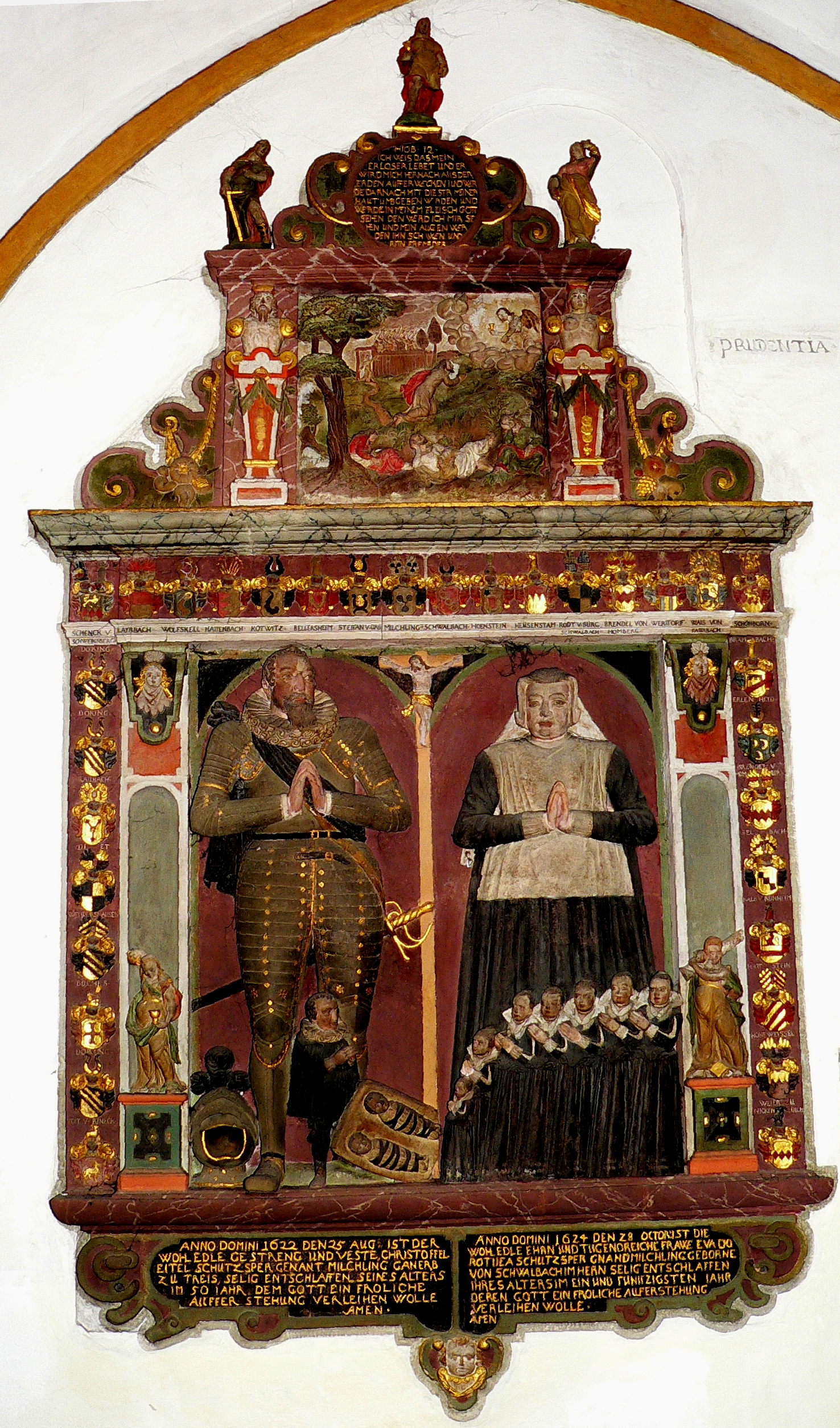 Epitaph der Christoffel Eitel von Schutzbar und Frau Eva Dorothea in der ev. Kirche in Treis an der Lumbda (Hessen, Deutschland).